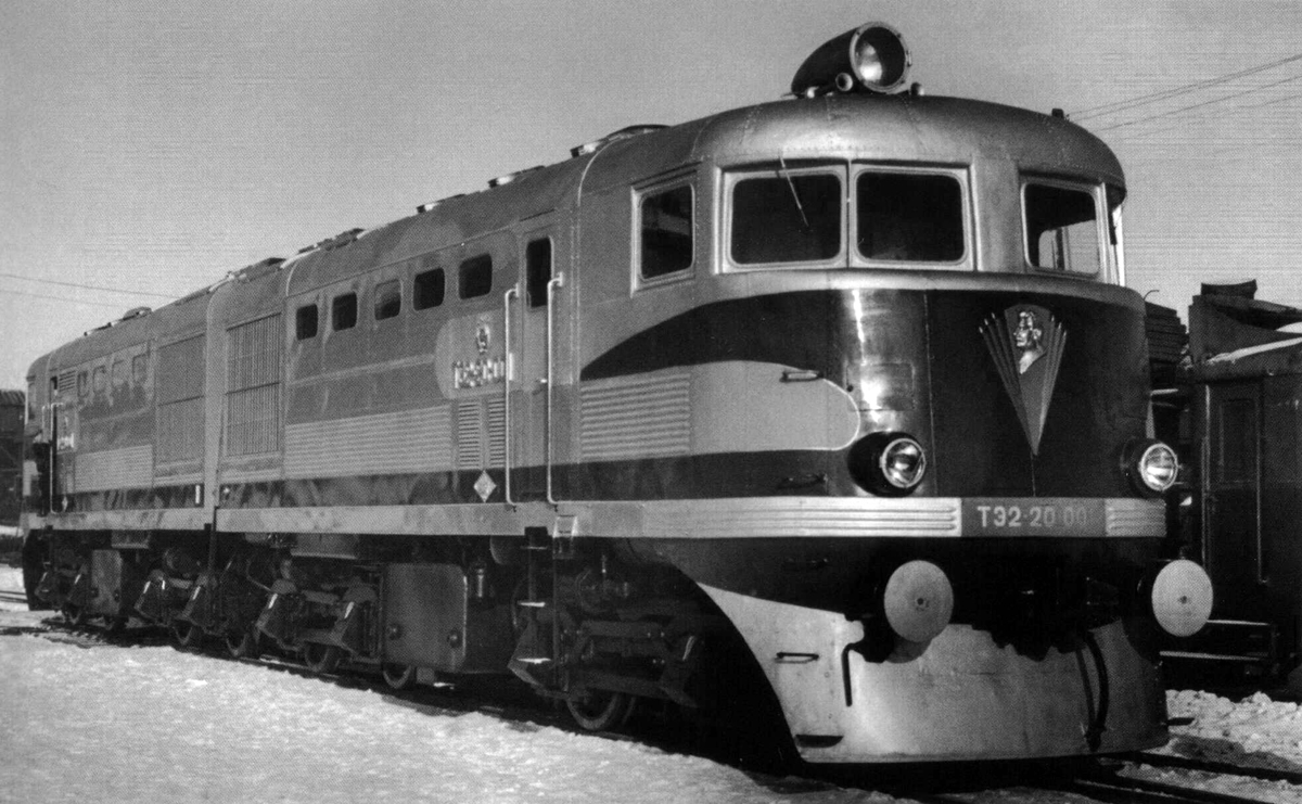 Тепловоз ТЭ2-20-001 (первый тепловоз ТЭ2) на Харьковском заводе транспортного машиностроения. Декабрь 1948 года